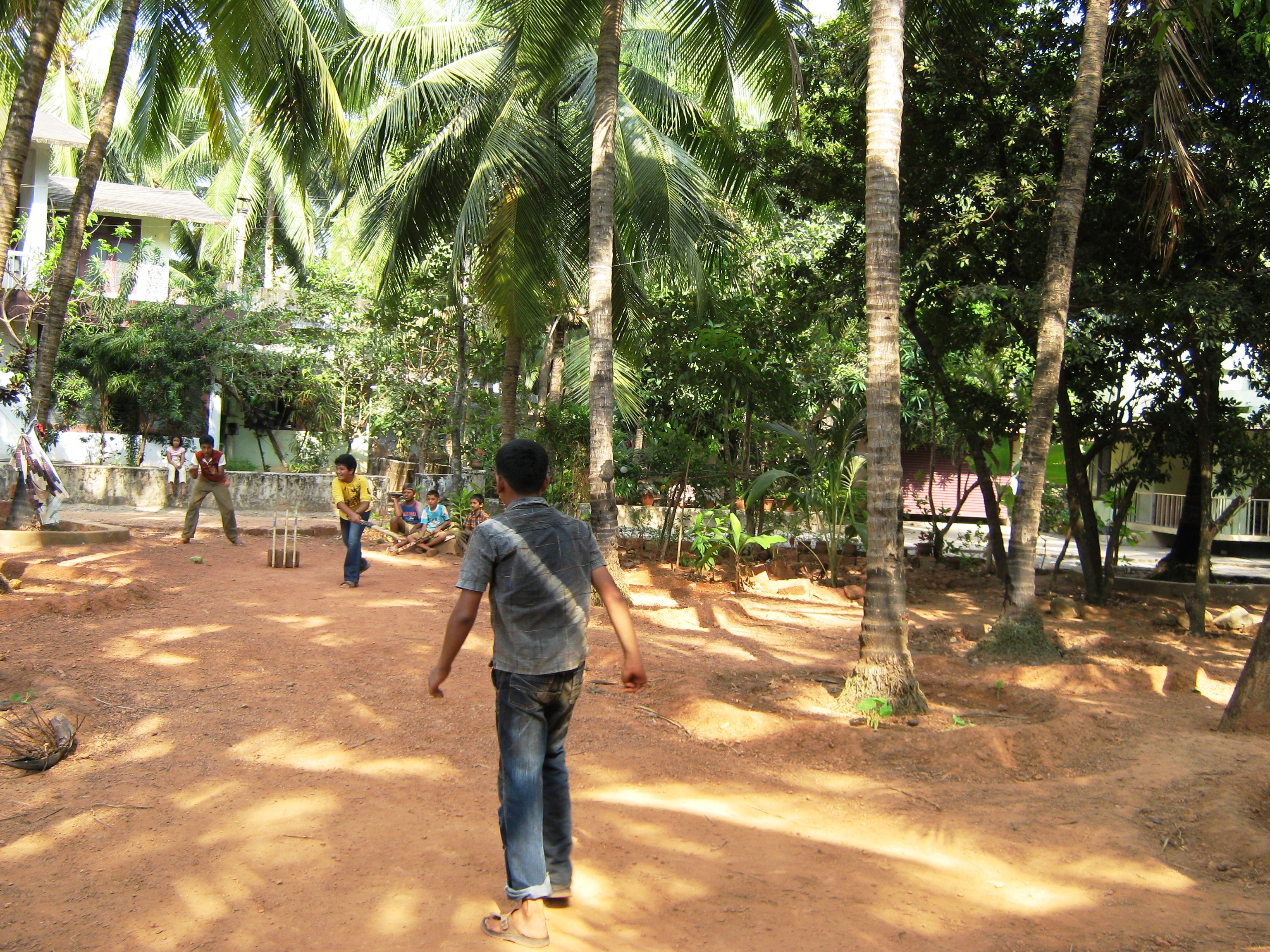 Beach Road, Kanhangad, Kasaragod District, Kerala, India.